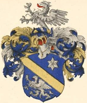 Preisi suguvõsa aadlivapp